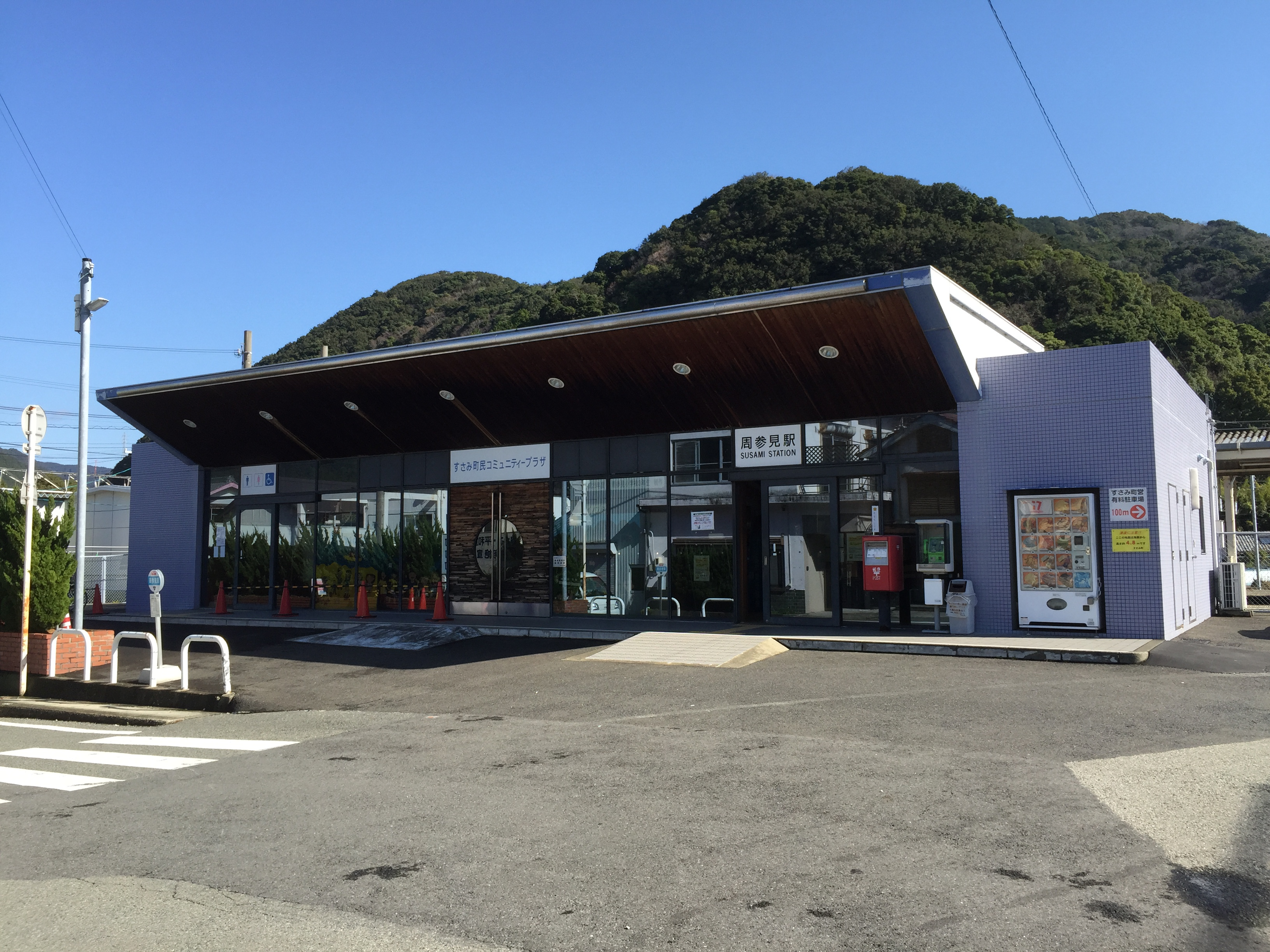 周参見駅駅舎